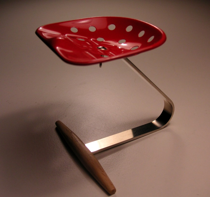 Castiglionis traktorstol "Mezzadro" från 1957 (modell 1:6)